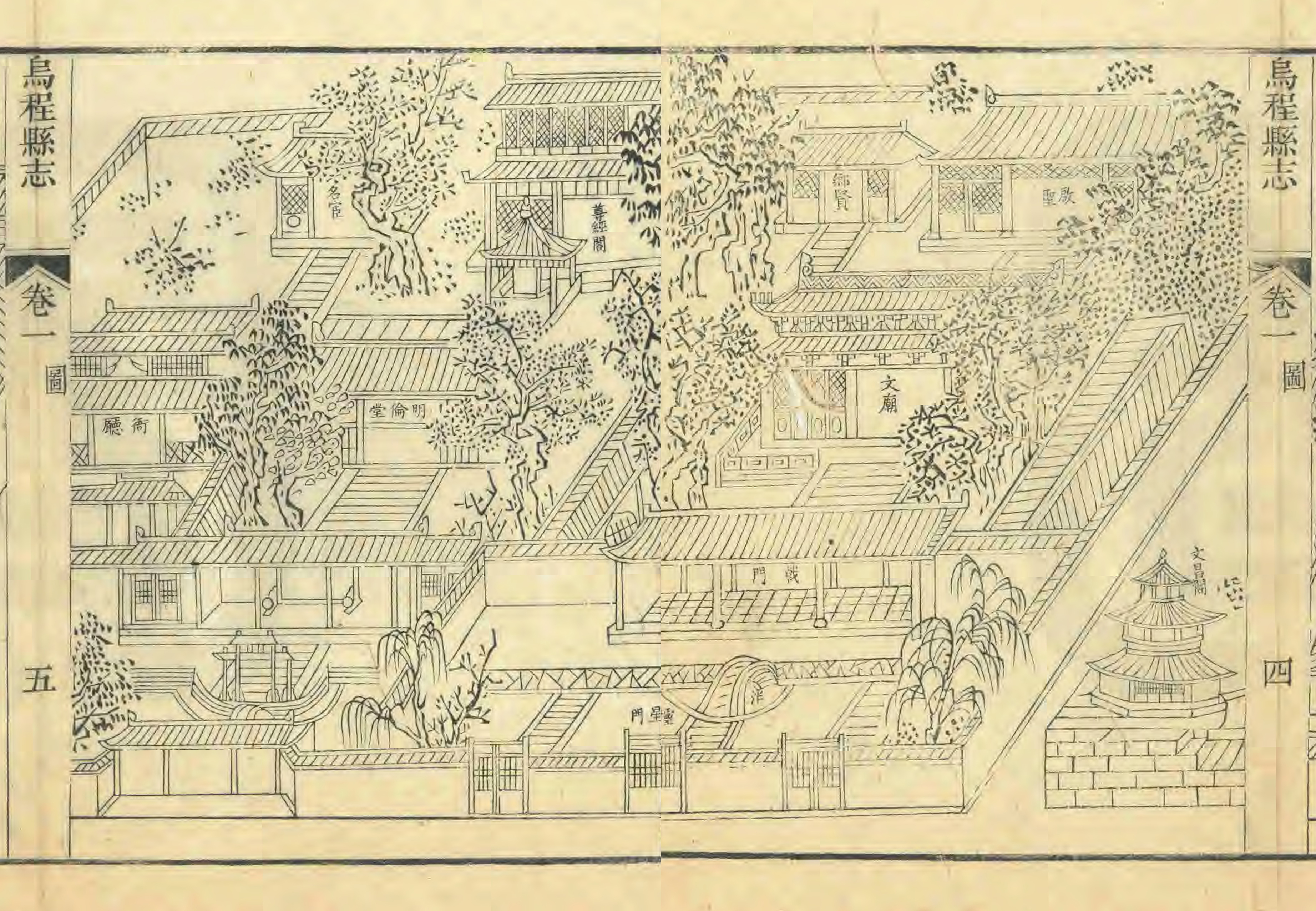 清乾隆十一年（1746）《乌程县志》学宫图。